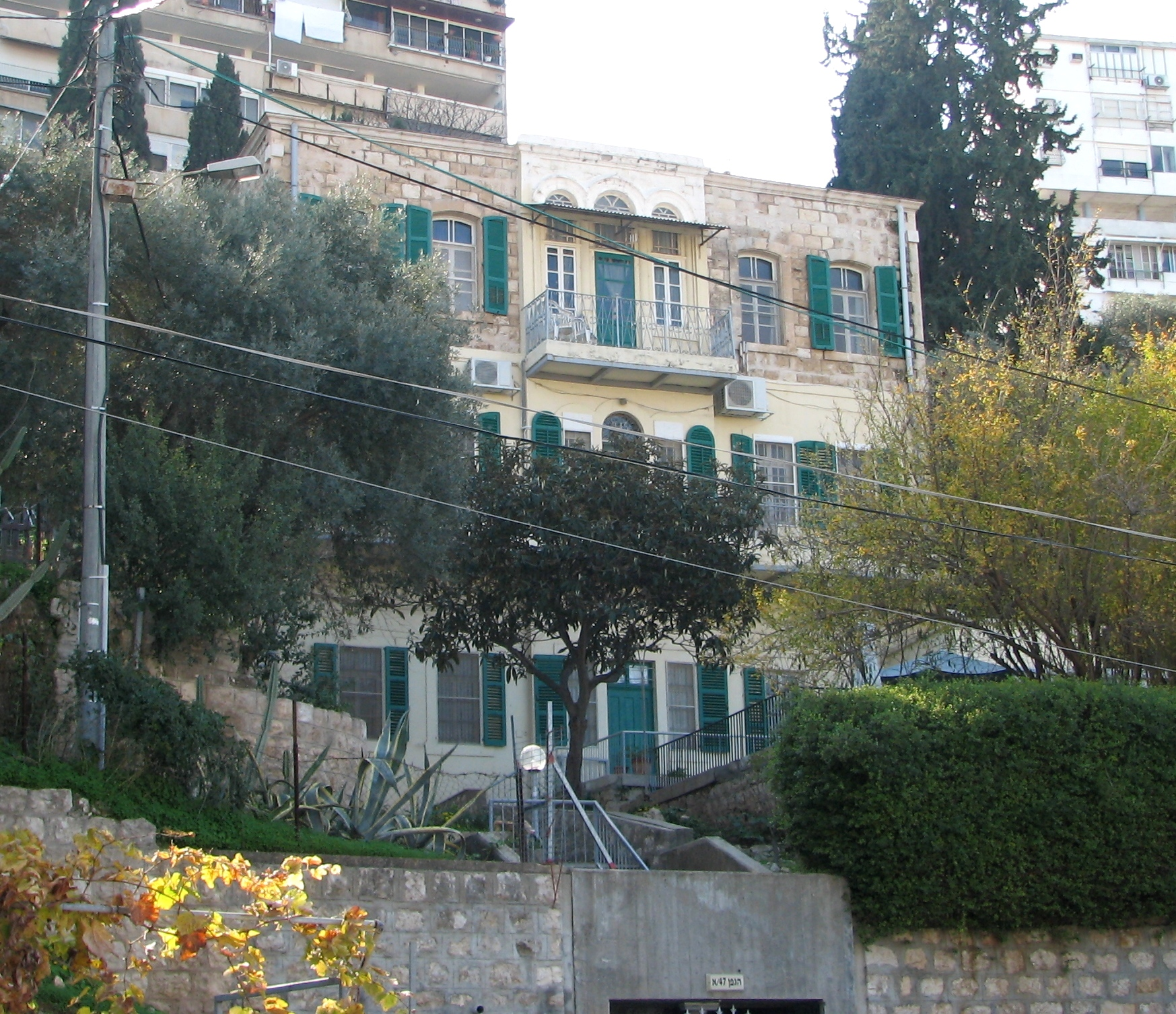 הבית ברחוב הגפן 47 א שימש בית החולים של ד"ר אליהו (אליאס) אַאוּרבך בחיפה בתחילת המאה ה-20